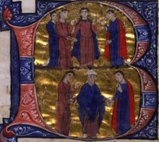 fiançailles et mariage de Guy de Lusignan et de Sibylle de Jérusalem (avril 1180)